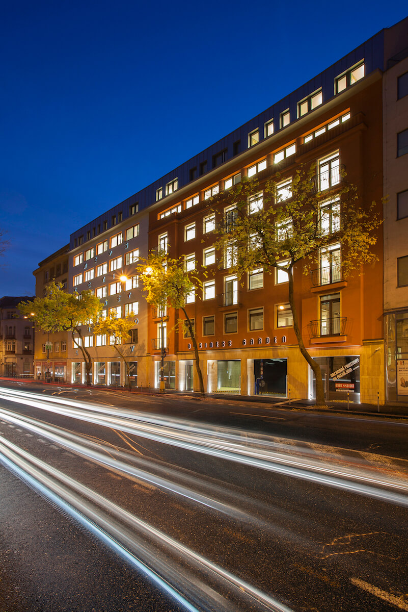 BGS faśada